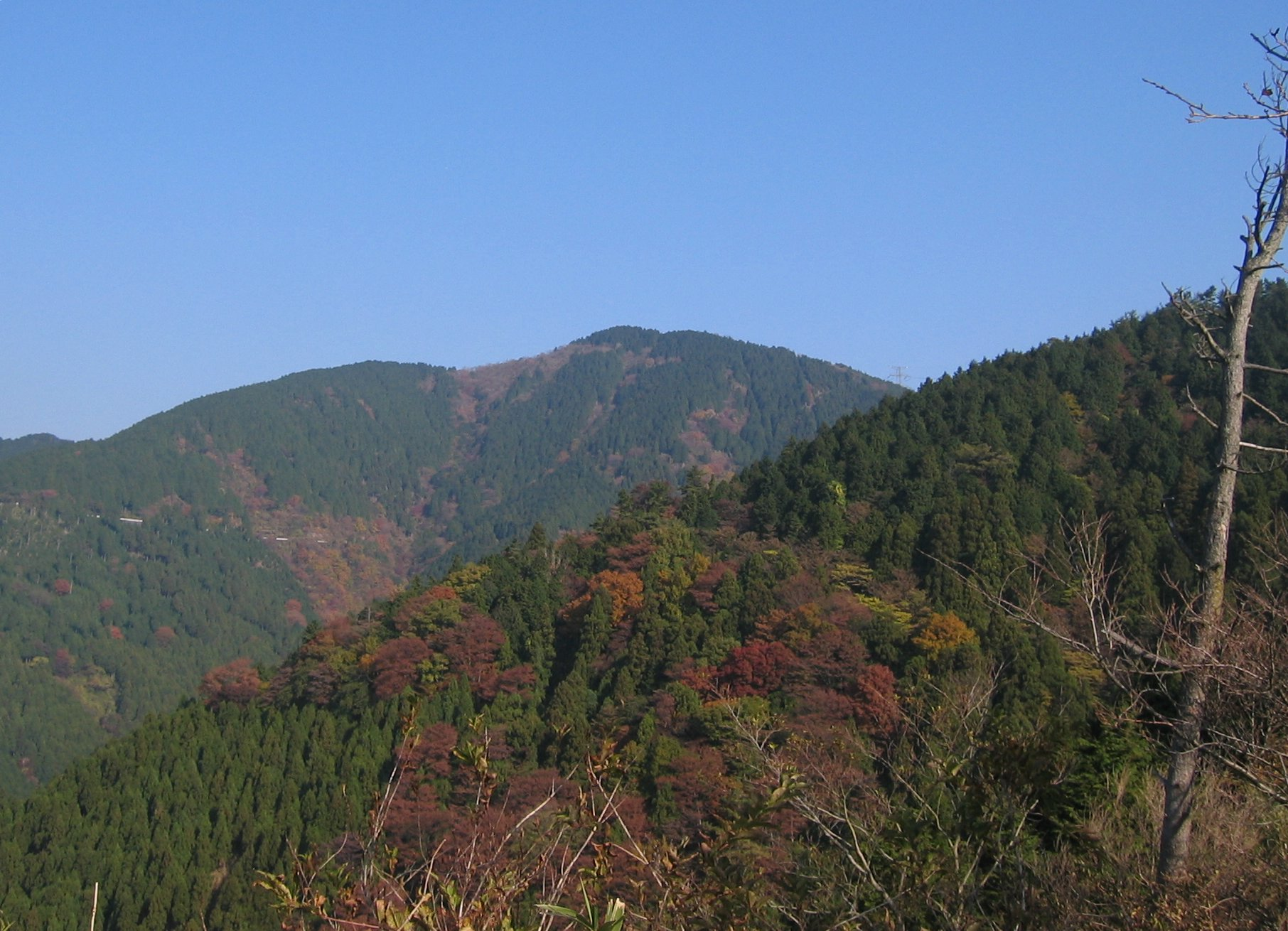 菜の花台より岳ノ台